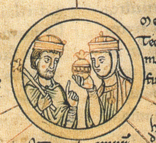 Jindřich Ptáčník a Matylda z Ringelheimu